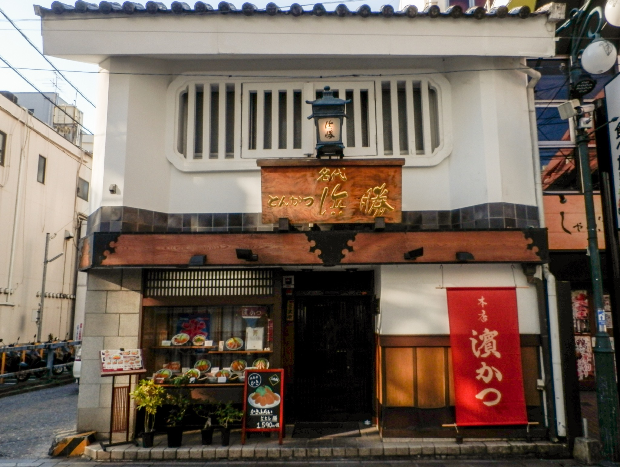 濱かつ鍛冶屋町店（本店）